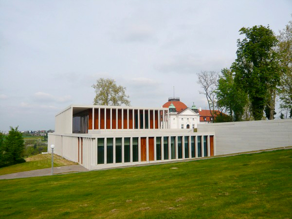 múzeum modernej literatúry v Marbachu